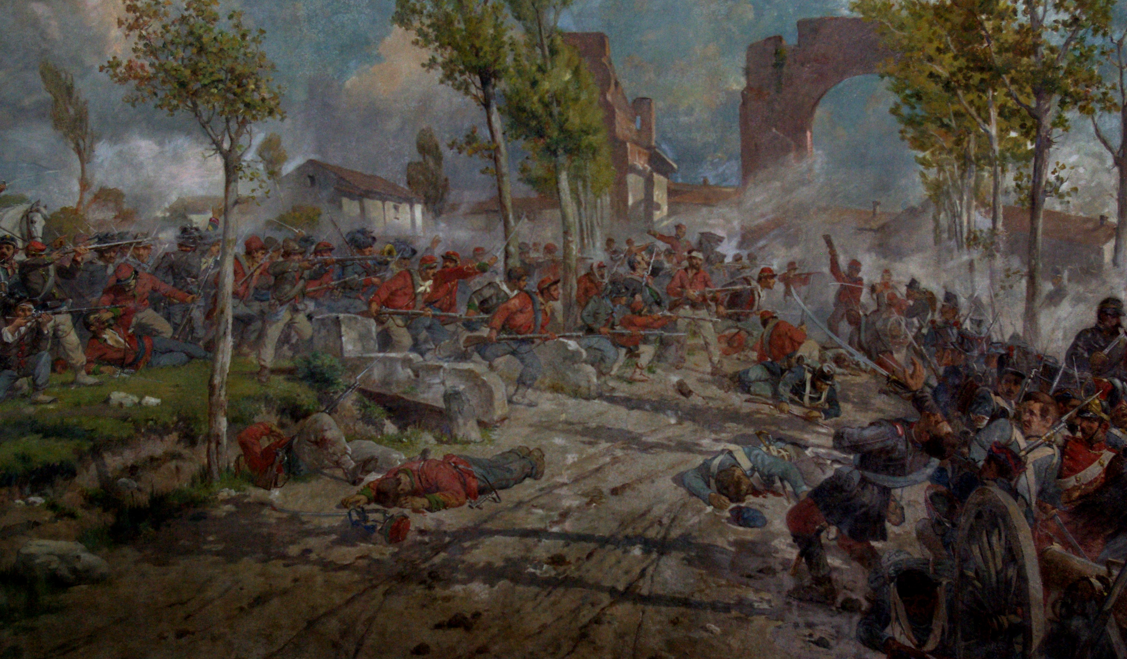 Ausschnitt eines Freskos im Turm von San Martino della Battaglia